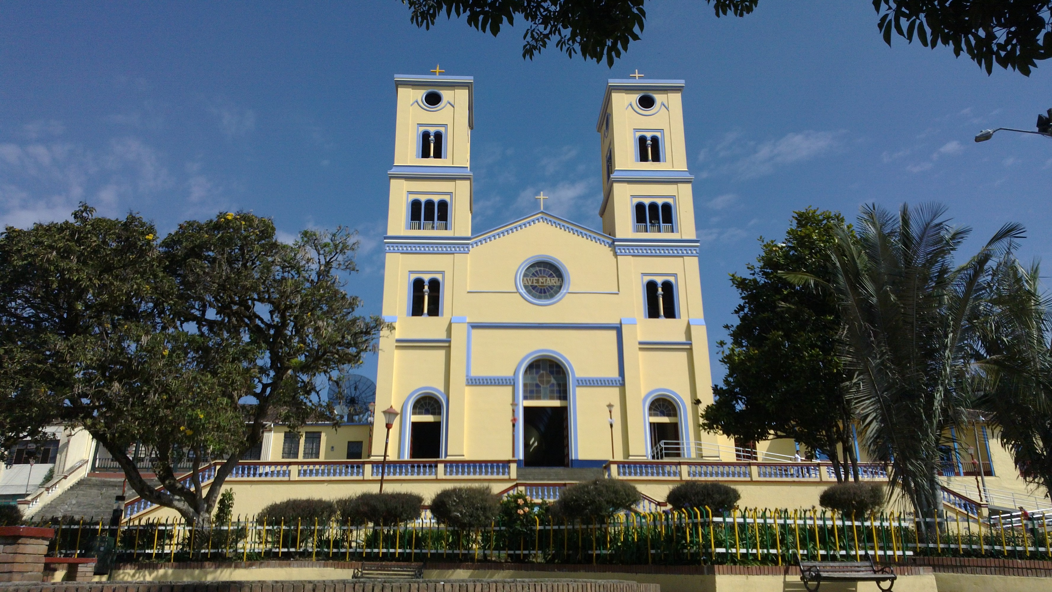 Ubicación: JUNIN, CUNDINAMARCA Fotografía tomada desde el parque principal frente a la alcaldía.